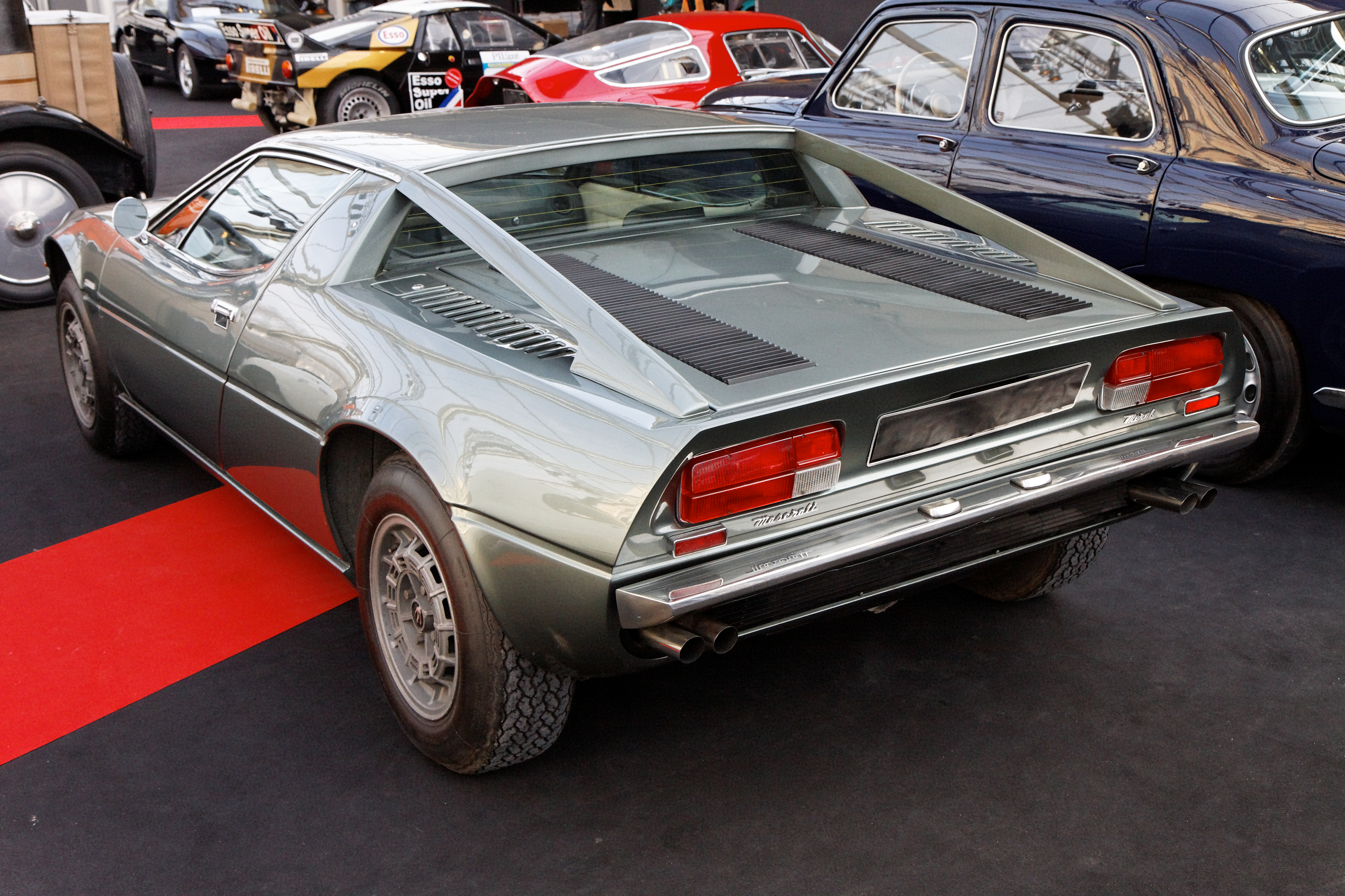 Maserati Merak - Festival Automobile International 2011 - Vente aux enchères